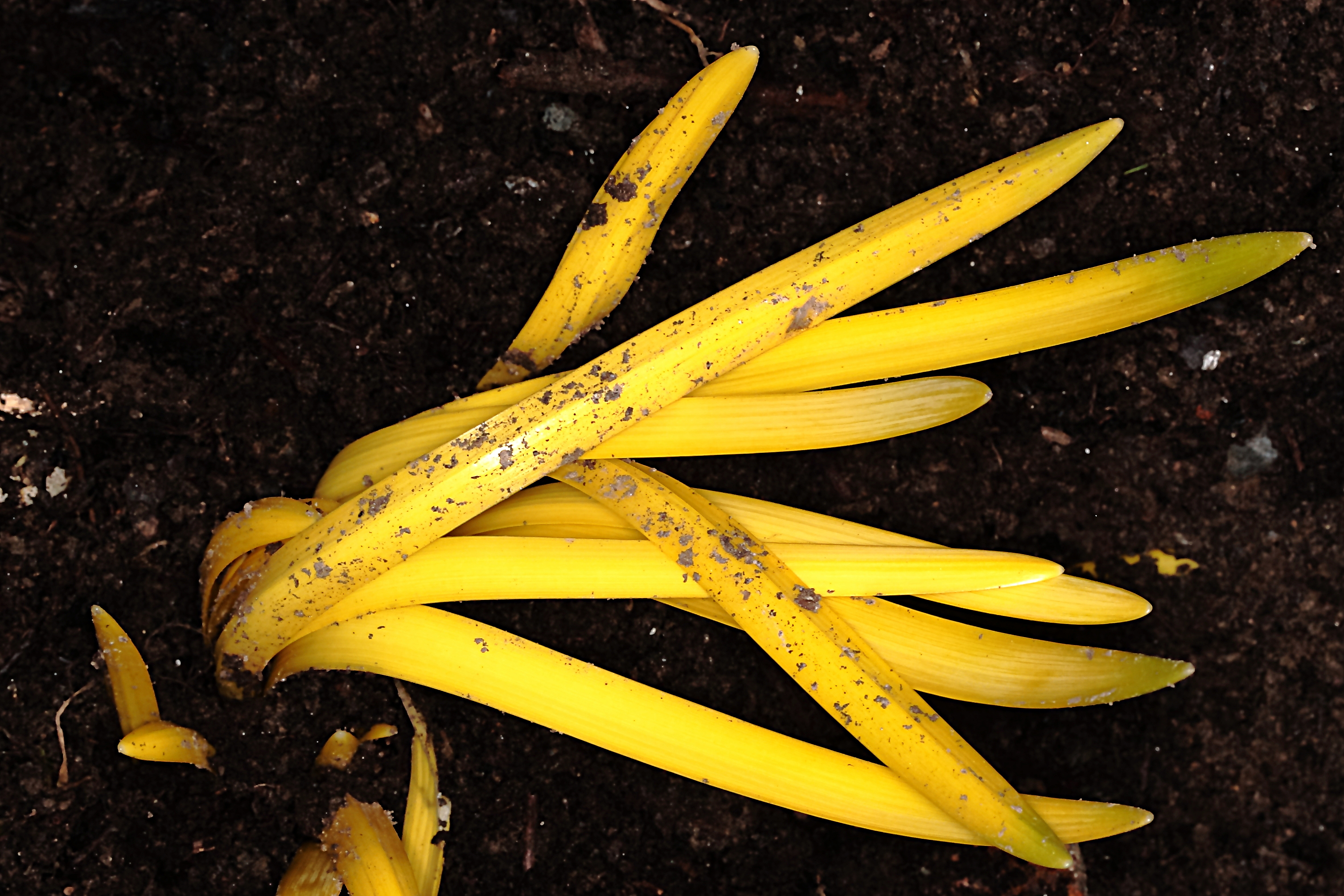 Narzissen-Blattwerk, Ende März aus dem Komposthaufen gegraben.